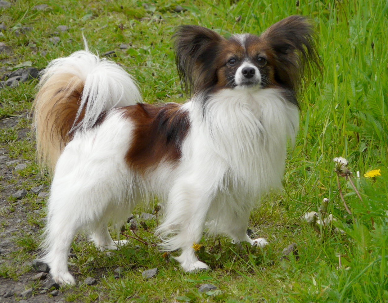 Un beau représentant de la race épagneul nain continental papillon, photographié en plein air.